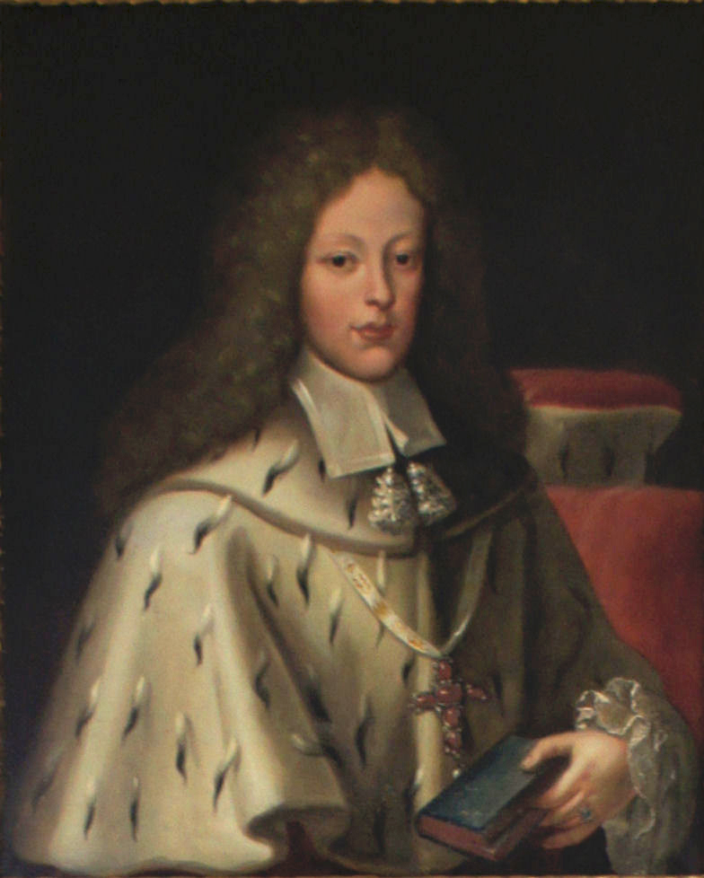 Porträtgemälde von Joseph Clemens von Bayern (1671-1723), Fürstbischof von Freising, im Fürstengang zwischen Fürstbischöflicher Residenz und Freisinger Dom.